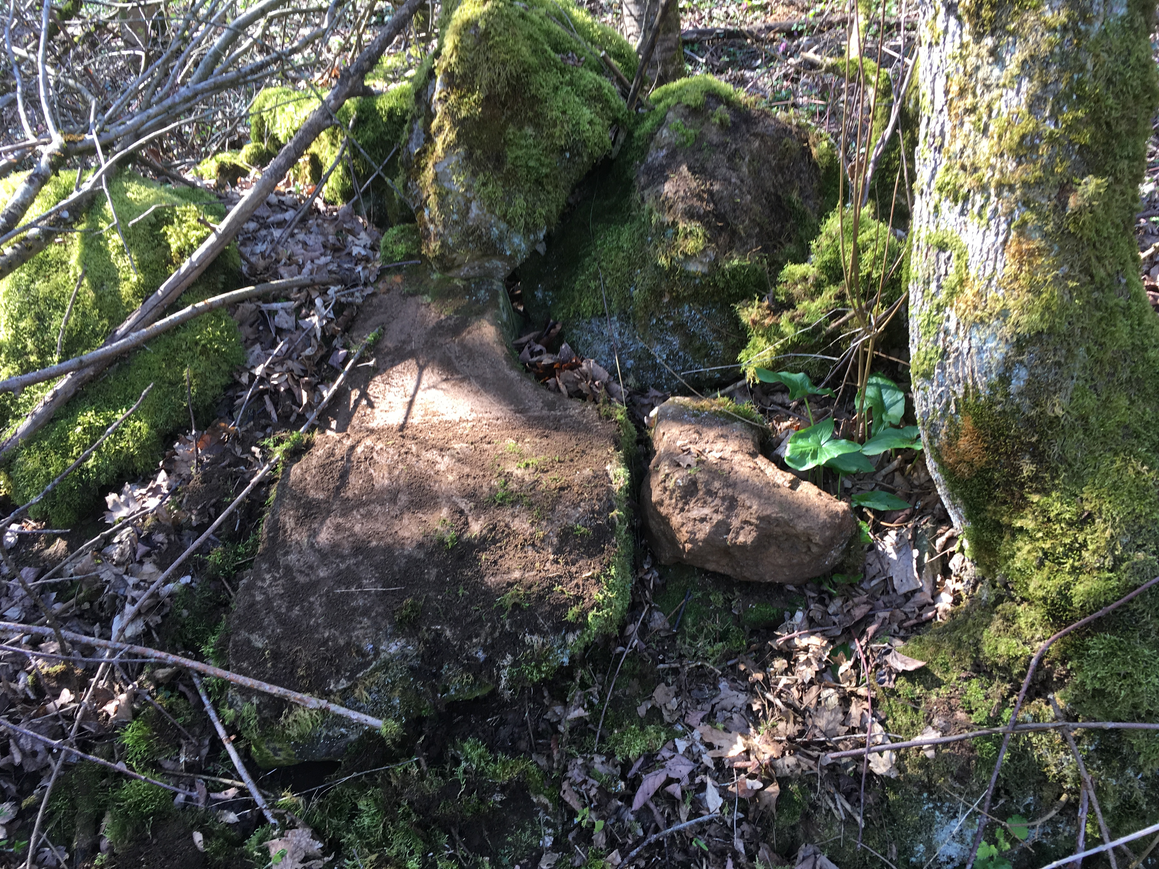 Restes de la Croix de Saint Privas qui se trouve sur la limite de Gémonville et d'Aroffe